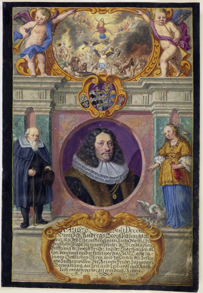 Andreas Georg Paumgartner; Pfleger der Mendelschen Zwölfbrüderstiftung Künstler: Hieronymus Franz Fuchs Transkription und weitere Informationen